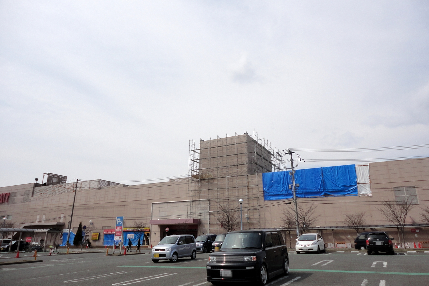 東日本大震災後のイオン一関店、看板撤去後